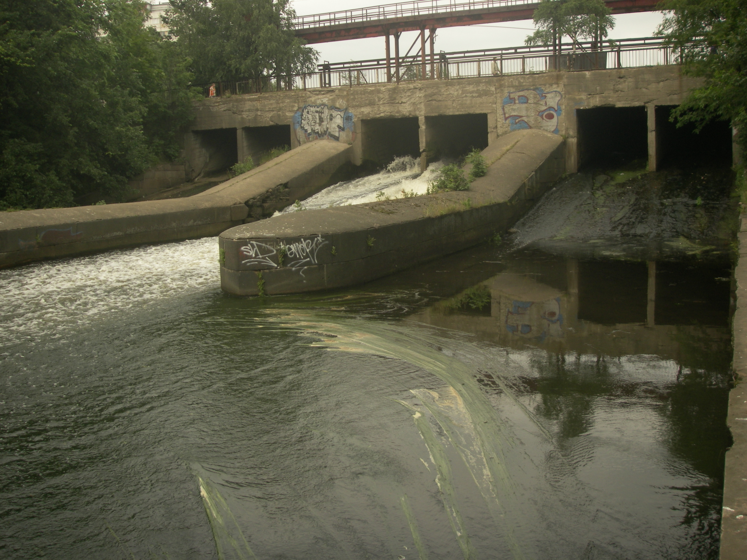 Вид на дамбу со стороны реки Охта